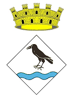 Escut de la població de Corbera d'Ebre